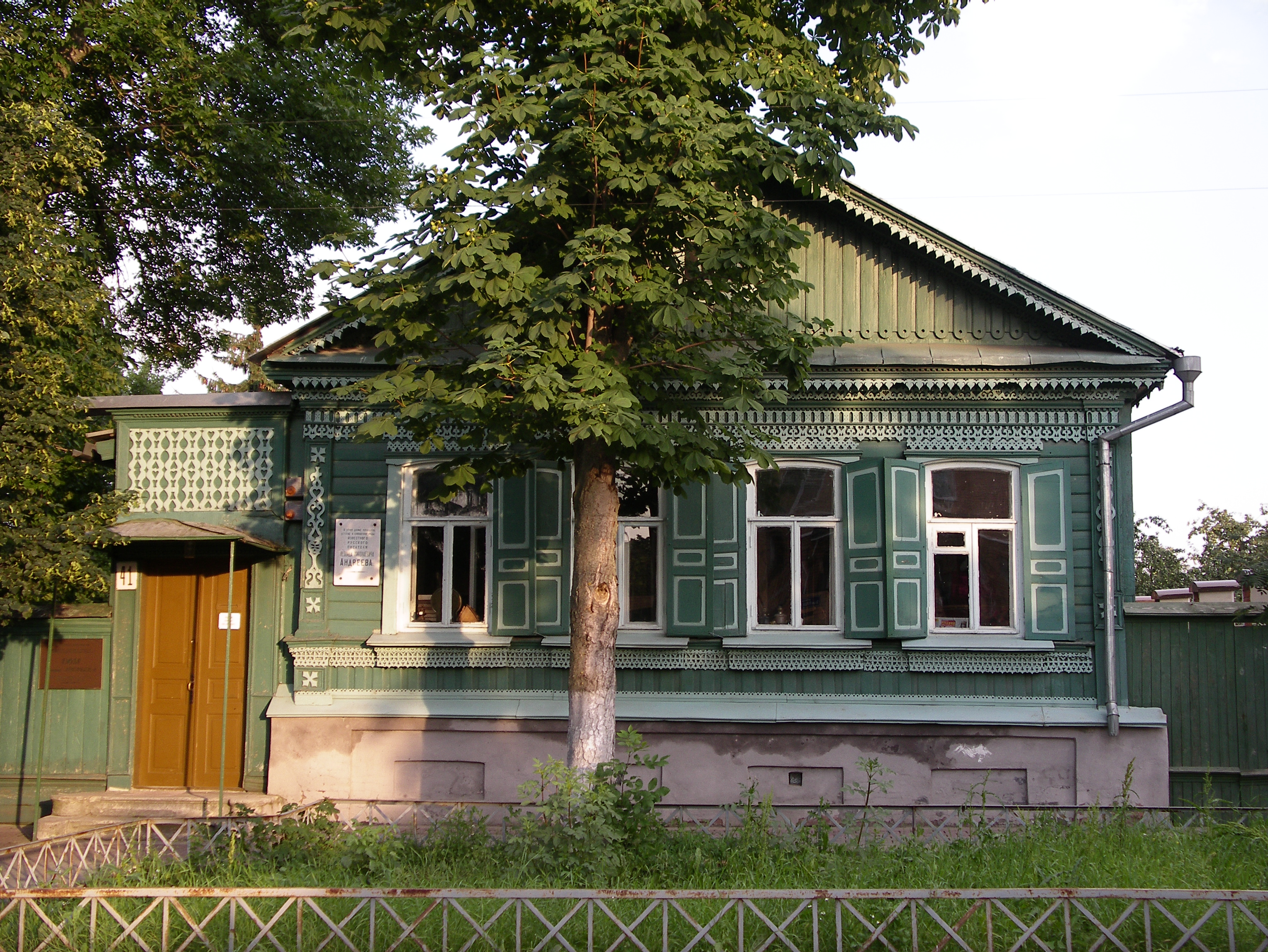 Музей Л. Н. Андреева в Орле